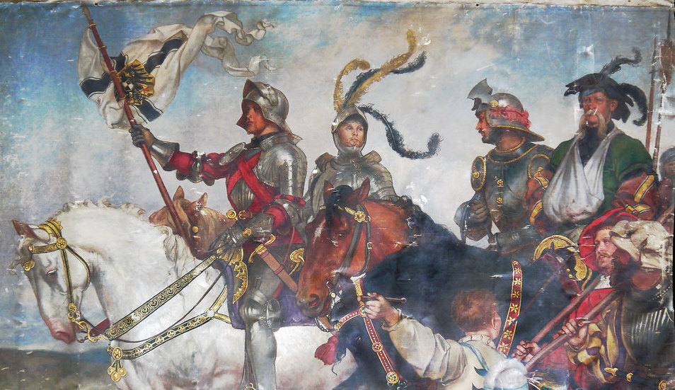 Rudolf Henneberg, Reiterzug, 1872